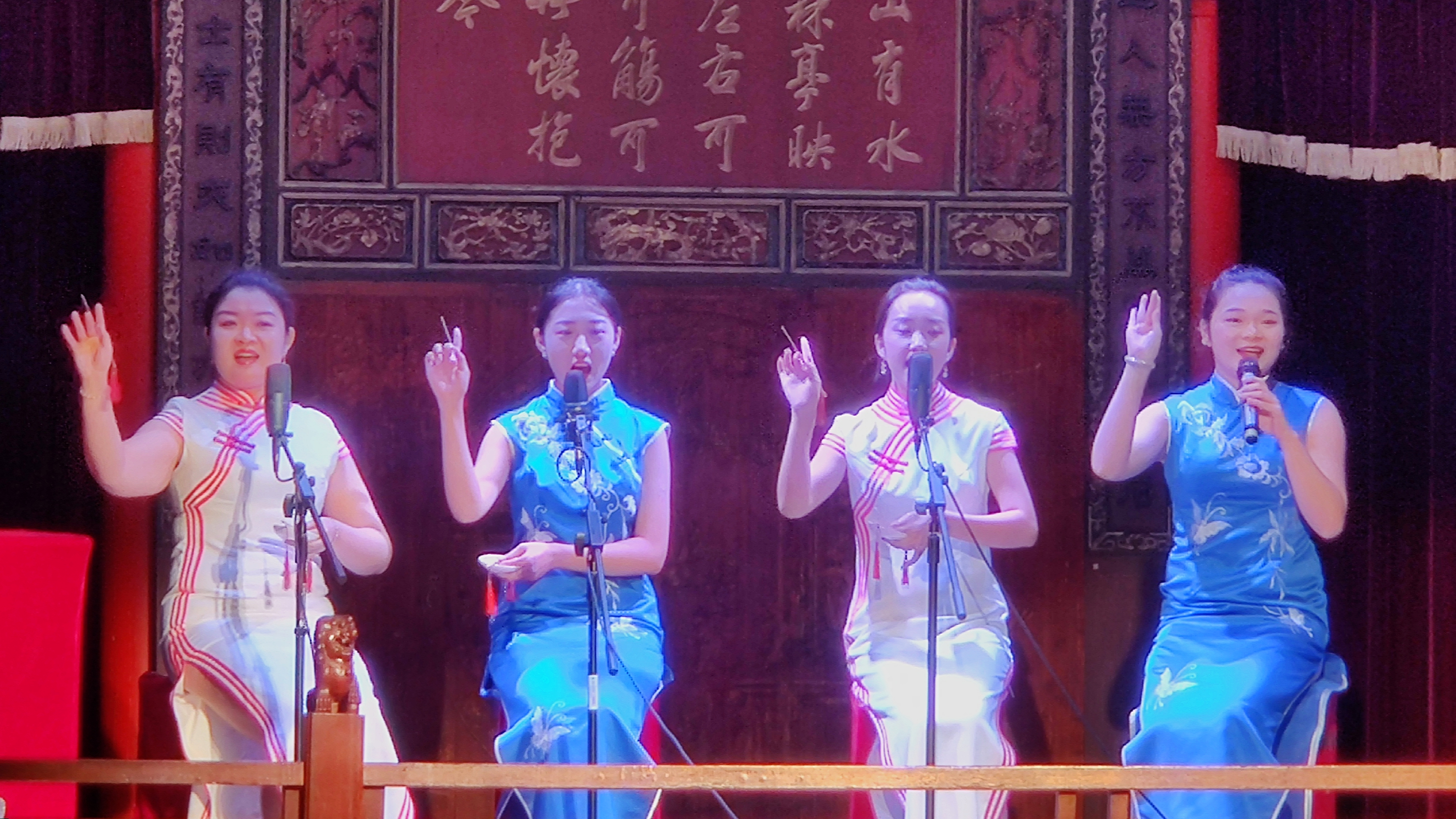 中文（中国大陆）: 白局传统曲目。徐磊等。